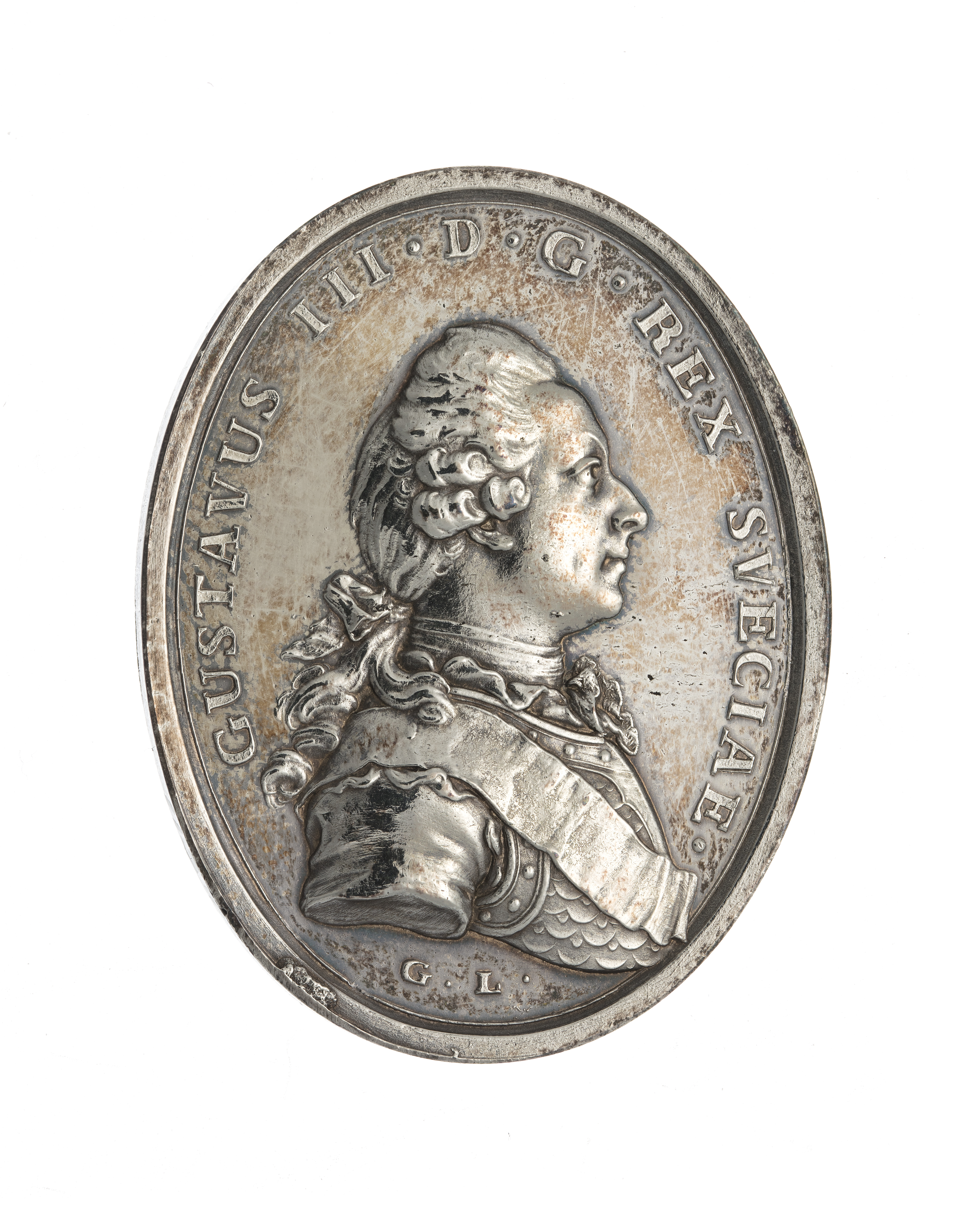 Åtsidan av Gustaf III:s Revolutionsmedlaj från 1772. Den visar kungens bröstbild, där han är iklädd harnesk. och ordensband. Runt kanten står det på latin; "GUSTAVUS III D G REX SVECIAE" (Gustav III av Guds Nåde Sveriges Konung) Denna medalj finns i Livrustkammarens samlingar med inventarienummer: 1134